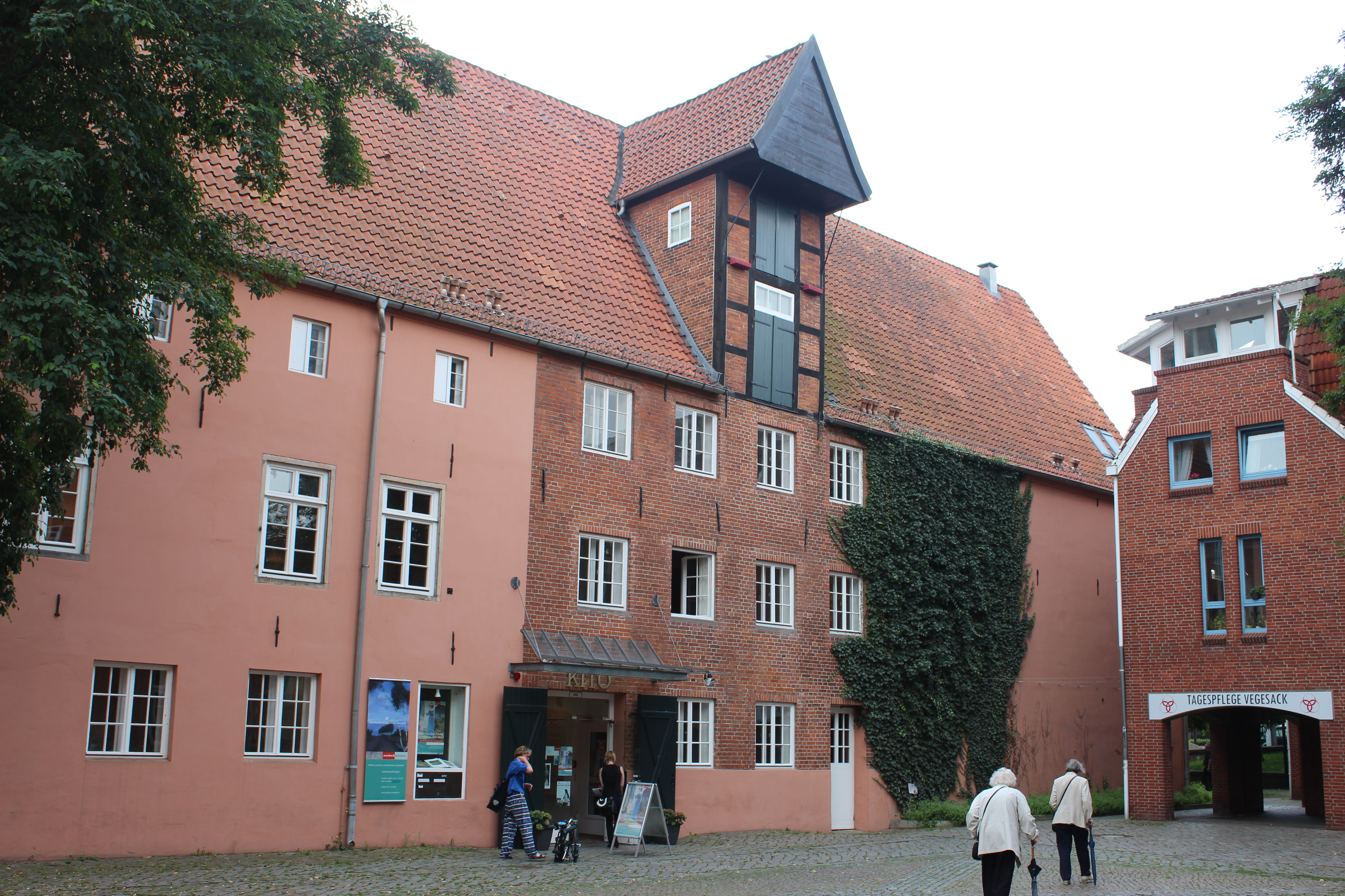 Kito-Haus, Altes Packhaus in Bremen, Alte Hafenstraße 30.Das abgebildete Objekt ist ein geschütztes Kulturdenkmal in der Freien Hansestadt Bremen, mit der Nr. 1246 beim Landesamt für Denkmalpflege registriert.